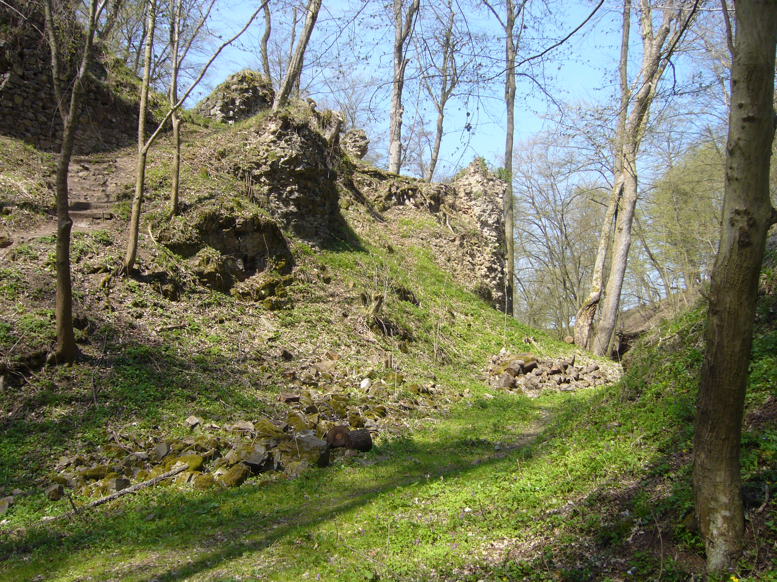 Šíjový příkop, Hrad Týřov, Karlova Ves (okres Rakovník).